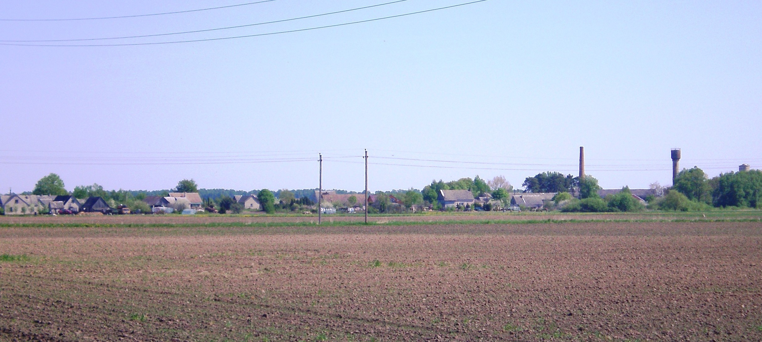 Aukštieji Kapliai, Kėdainių raj.